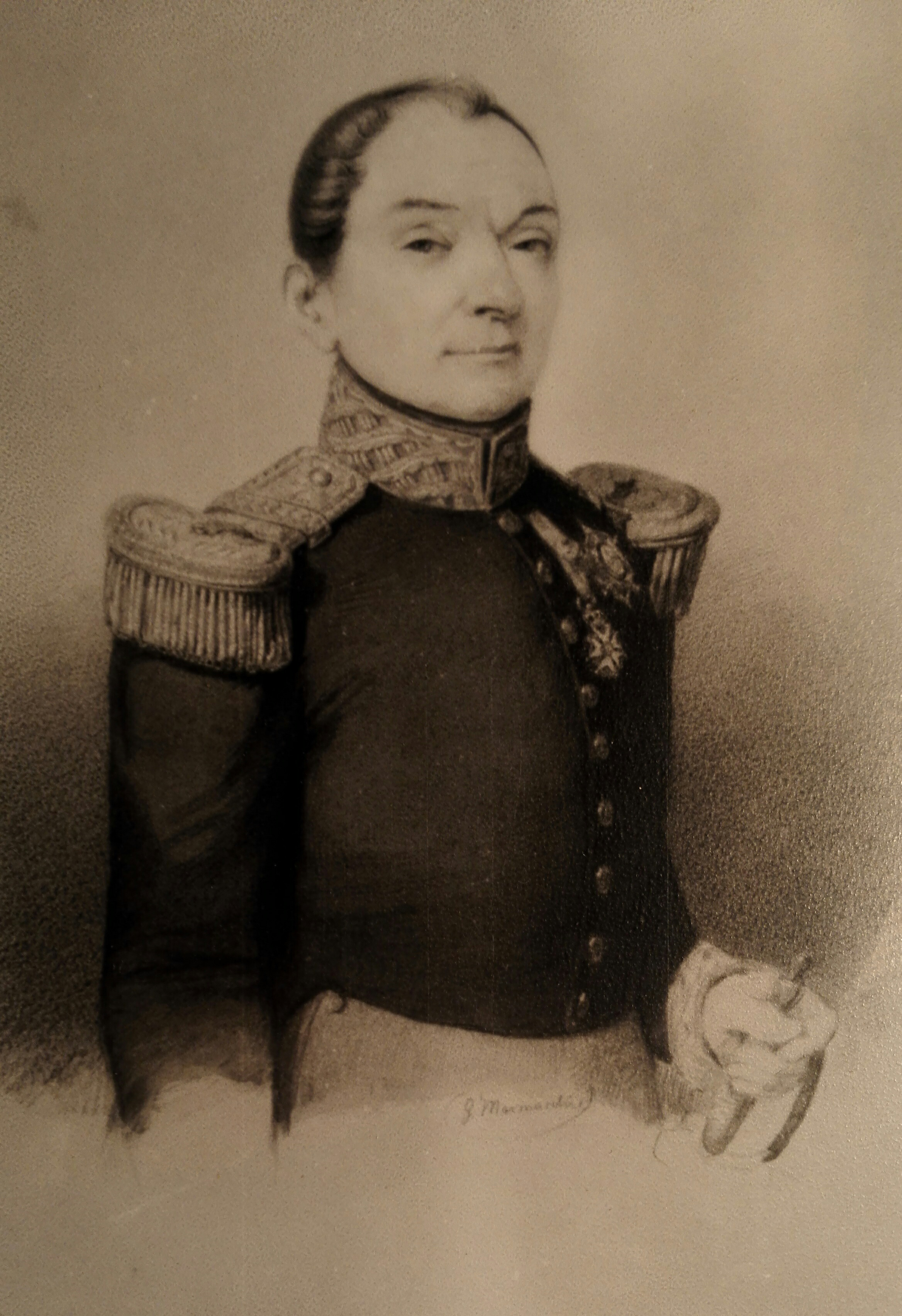 Giuseppe Carignani di Novoli, con la Gran Croce all'Ordine di Francesco I